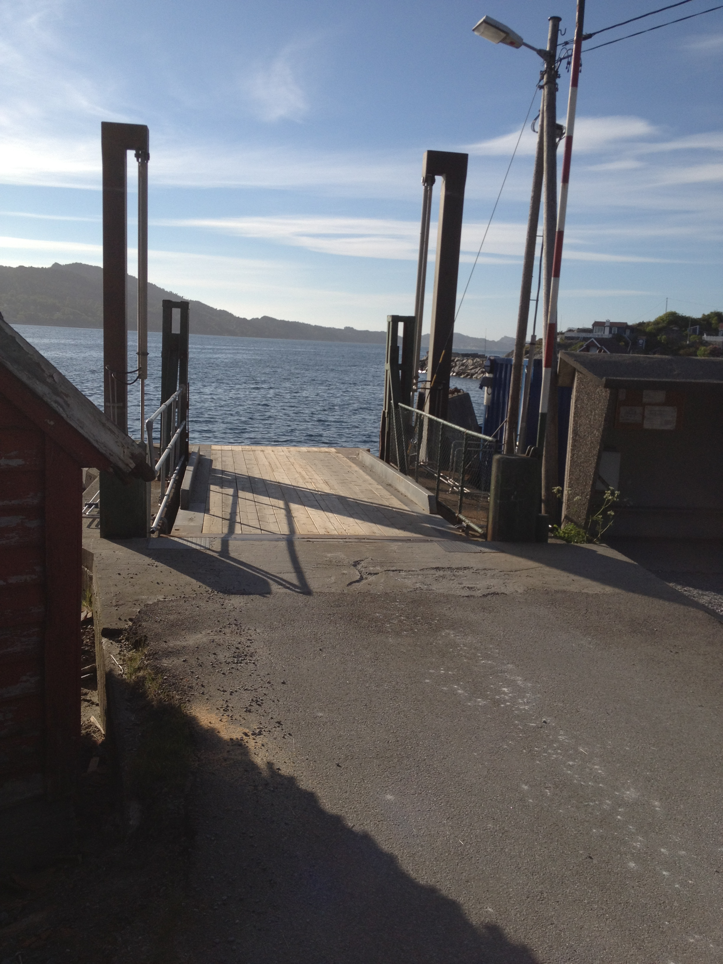 Lerøy ferjekai på Lerøy i Sund kommune.